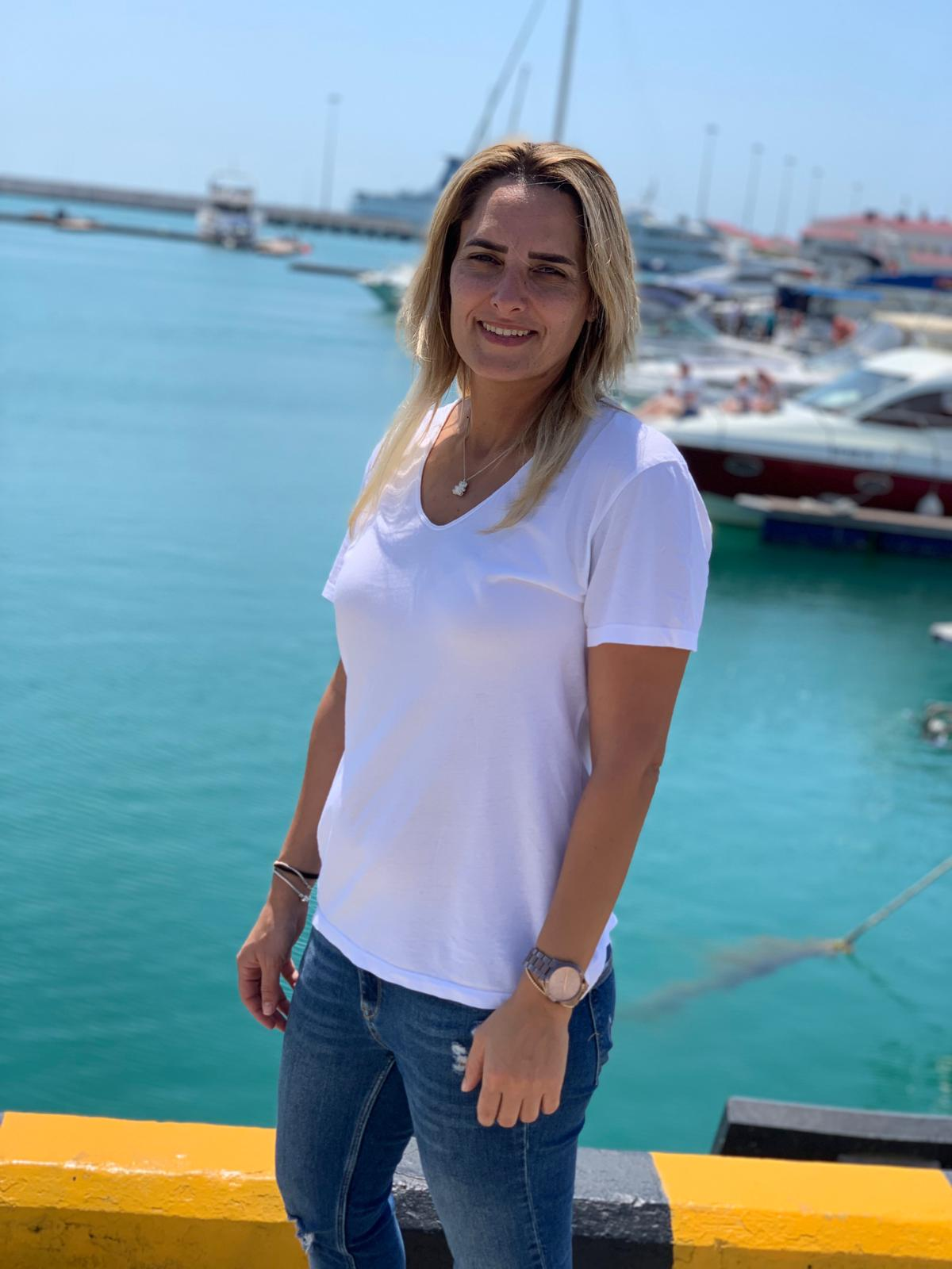 סיון פחימה, 2019